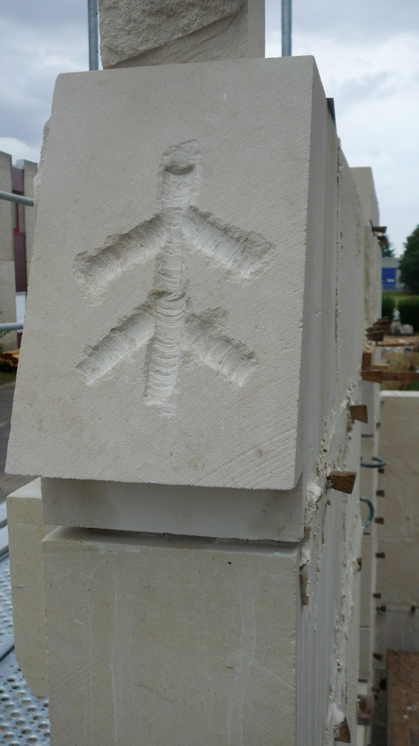 Cet abreuvoir sur la face de joint de sommier de plate-bande en pierre de taille ne descend pas jusque sur la face de dessous de manière à maintenir le coulis de mortier sur la face de joint.